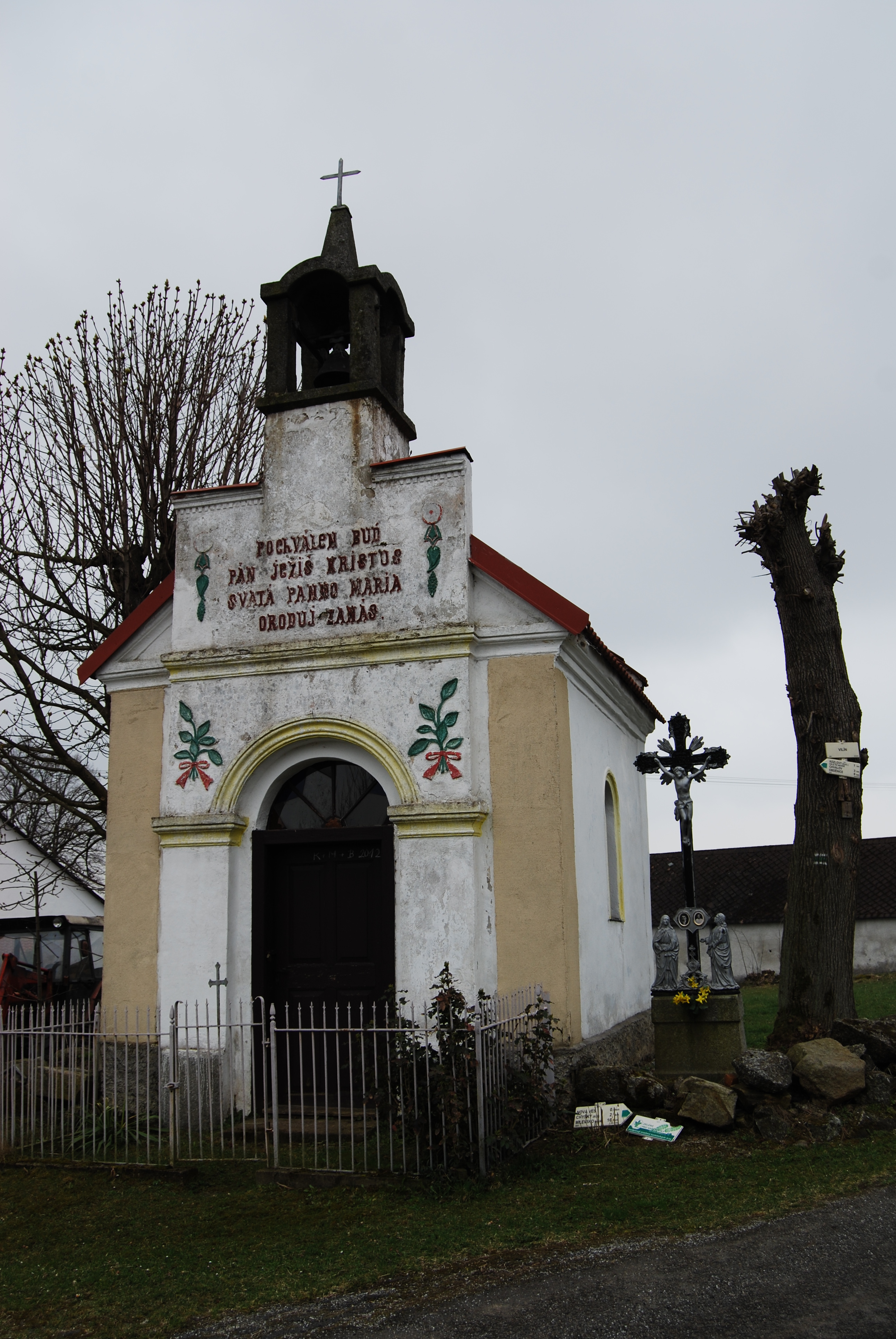 Návesní kaple zasvěcená Panně Marii. Vilín je malá vesnice, část obce Chyšky v okrese Písek. Česká republika.